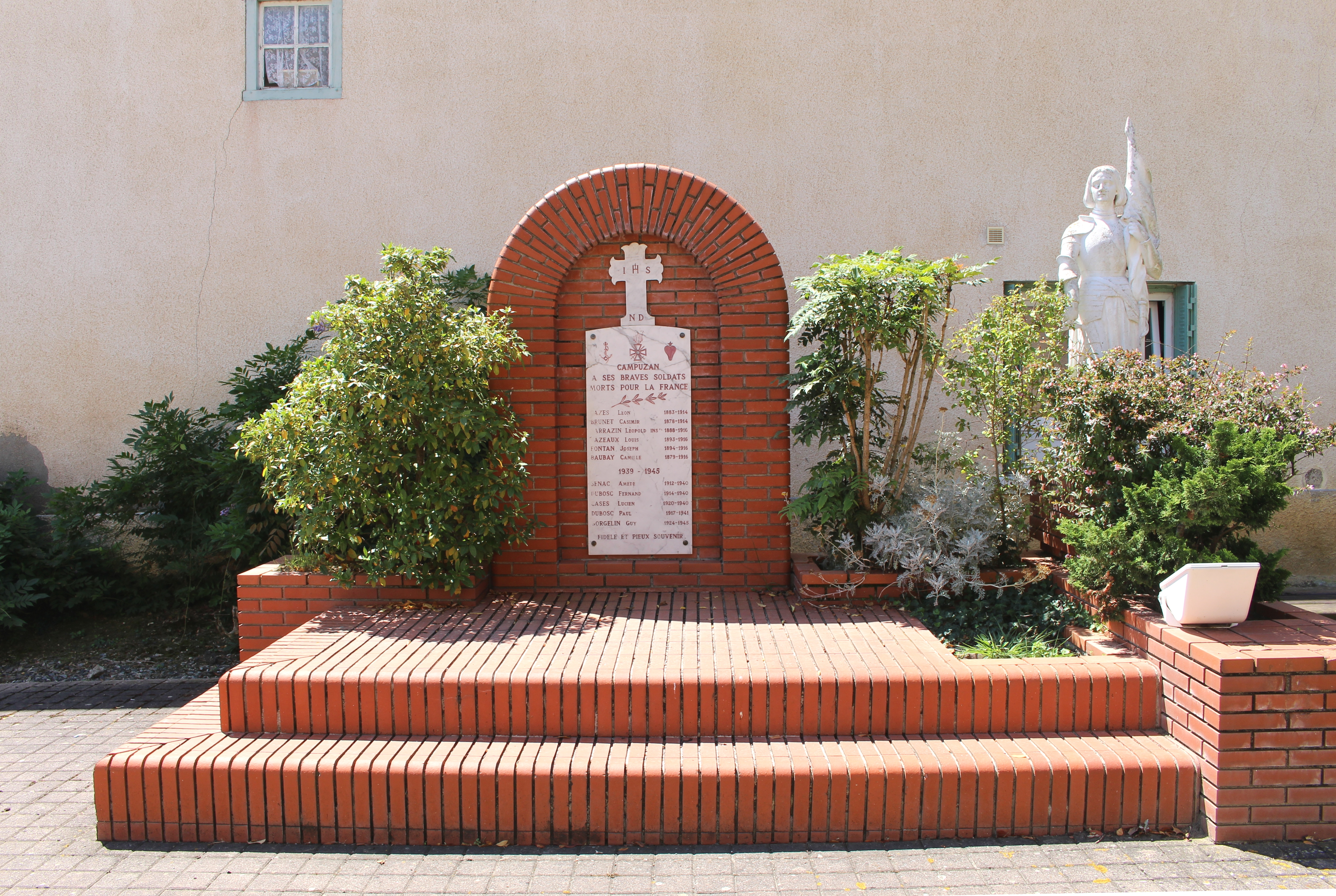 Monument aux morts de Campuzan (Hautes-Pyrénées)